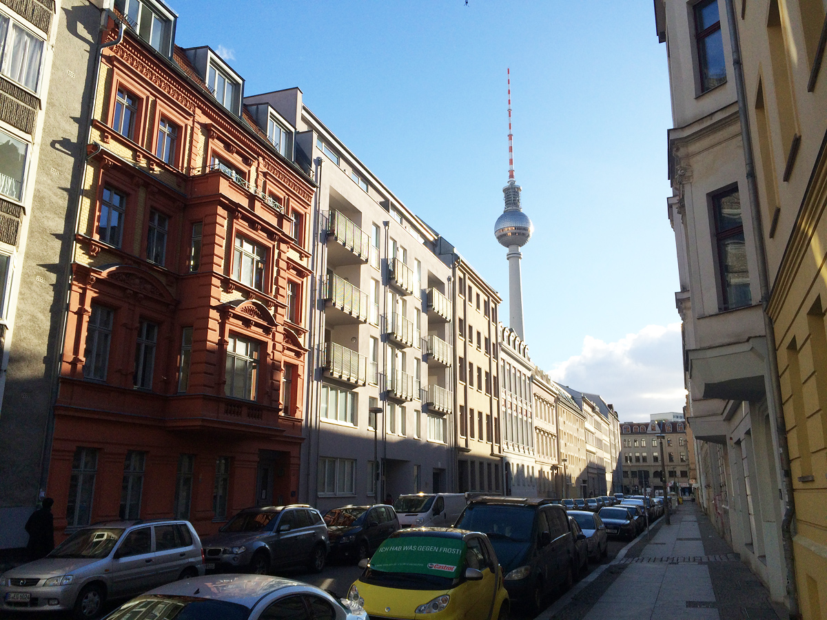 Almstadtstraße im Jahr 2015